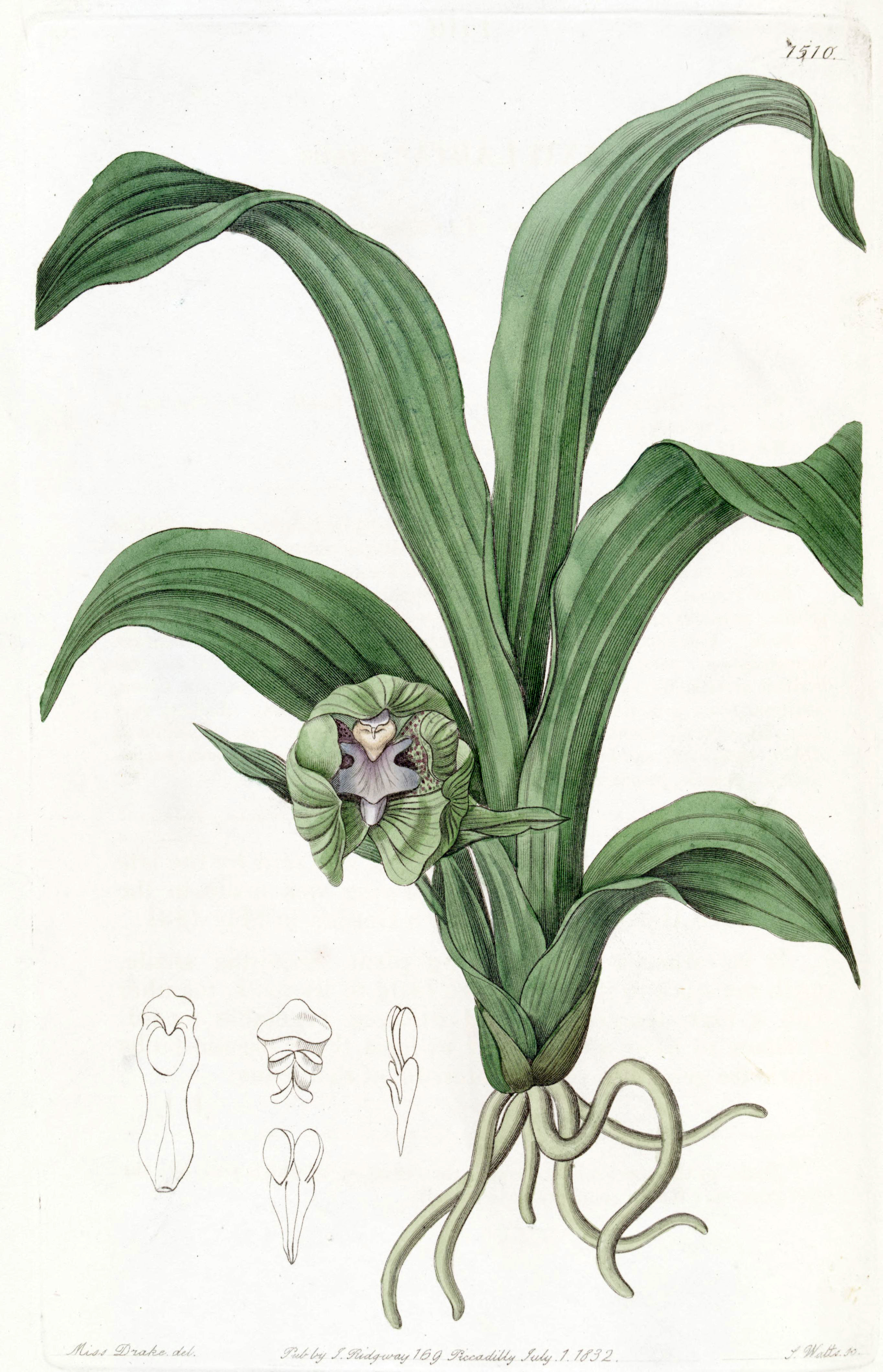 Pabstia viridis (as syn. Maxillaria viridis)